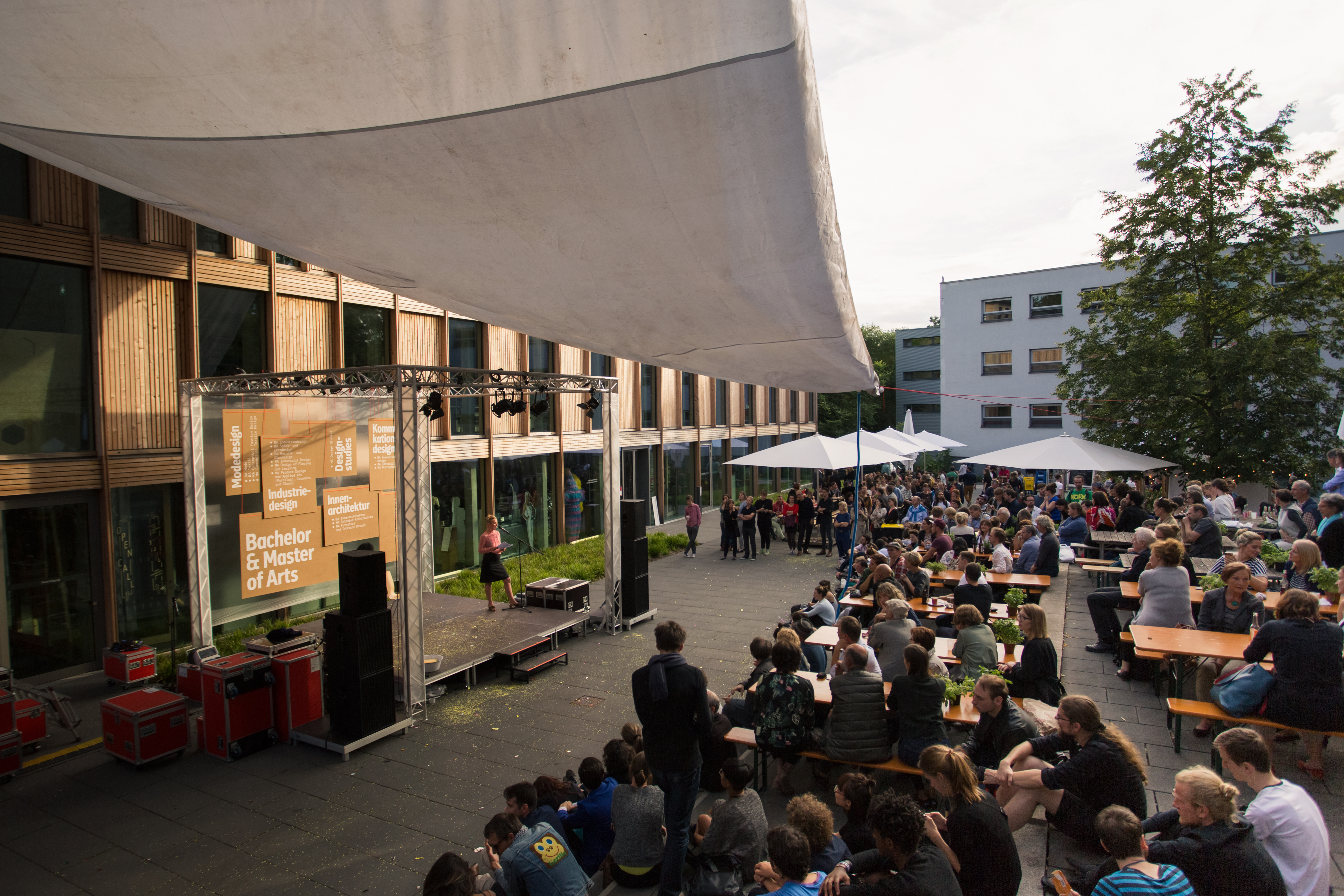 Im Rahmen der Jahresausstellung werden jedes Jahr die Bachelor- und Masterurkunden an die Absolventen der Hochschule verliehen.